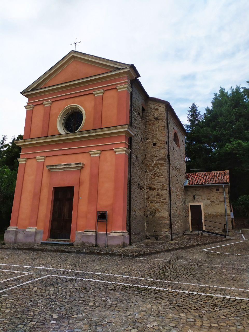 Edificio storico